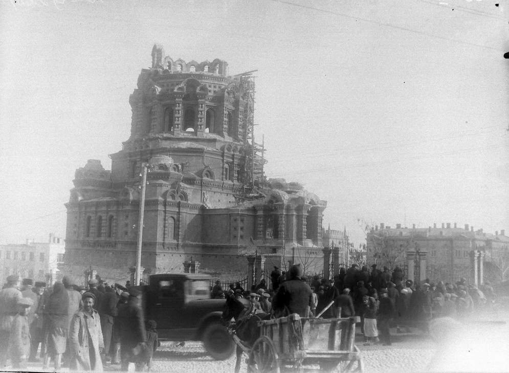 Баку. Снос Александро-Невского Собора